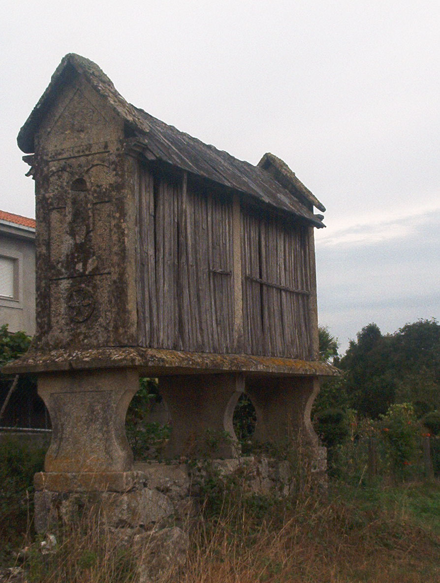 Hórreo tipo mahía en Seone (Antas de Ulla), sobre soleira de mampostería e tres cepas. Un dos poucos deste concello con cuberta de lousa.